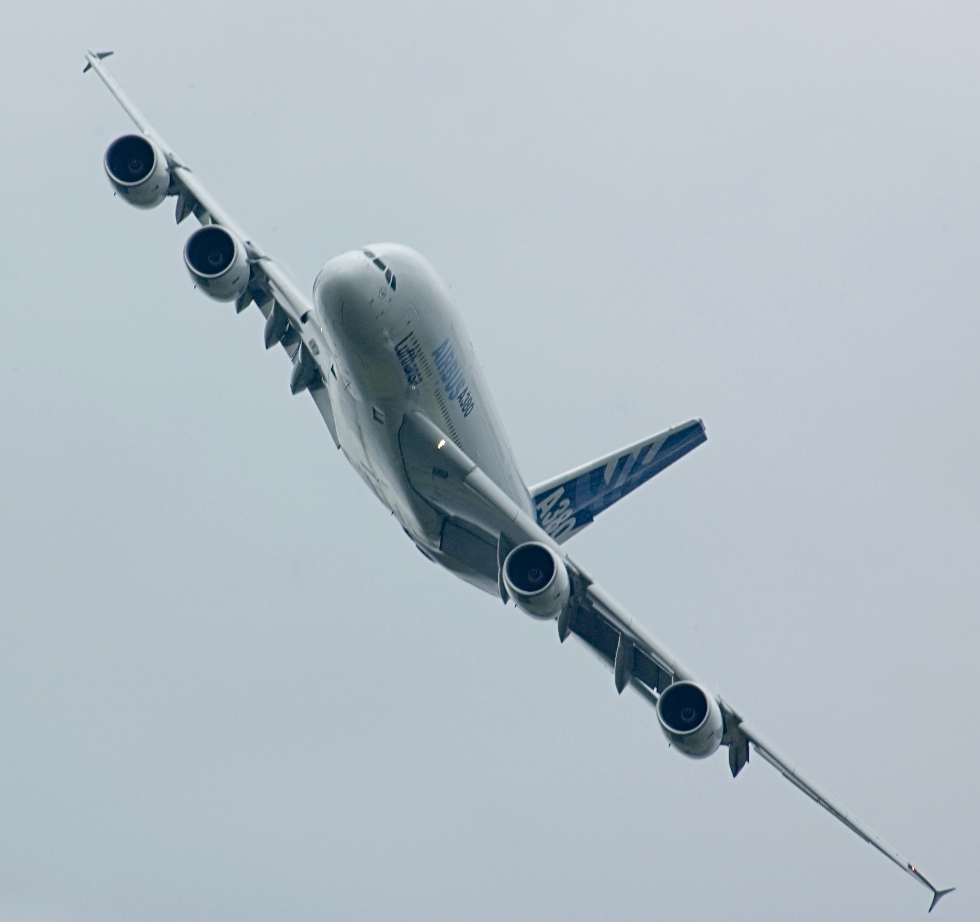 A380 im schnellen Vorbeiflug auf der ILA 2006